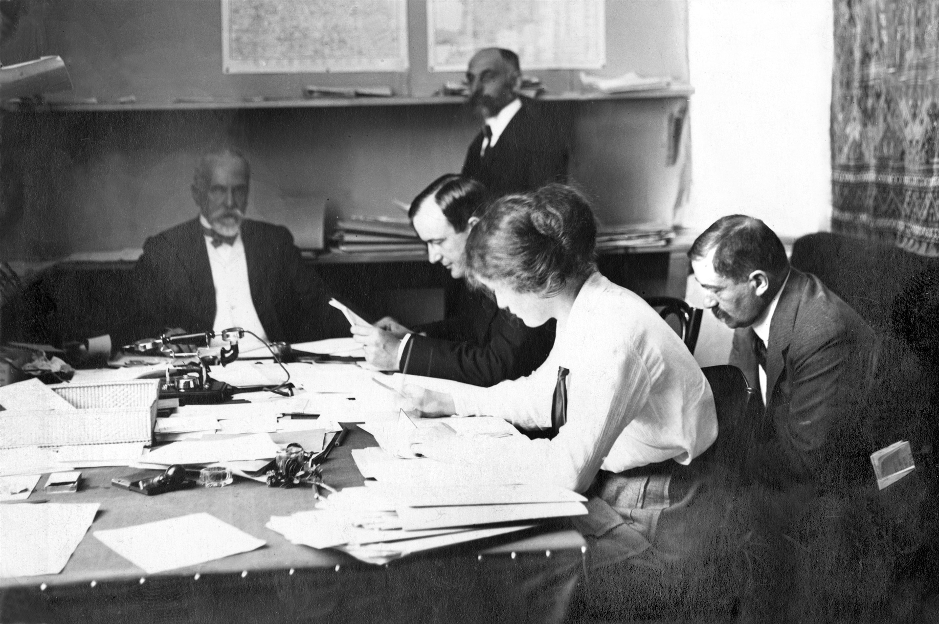 Genève, Musée Rath. Agence internationale des prisonniers de guerre. Service spécial des télégrammes. De gauche à droite: Gustave Ador, Frédéric Barbey, Paul des Gouttes (debout), Mlle Odette Micheli, Horace Micheli. Première guerre mondiale.